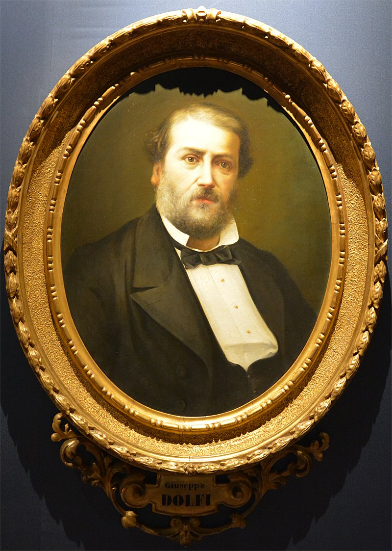 Giuseppe Dolfi, Porträt gemalt von Nino Costa